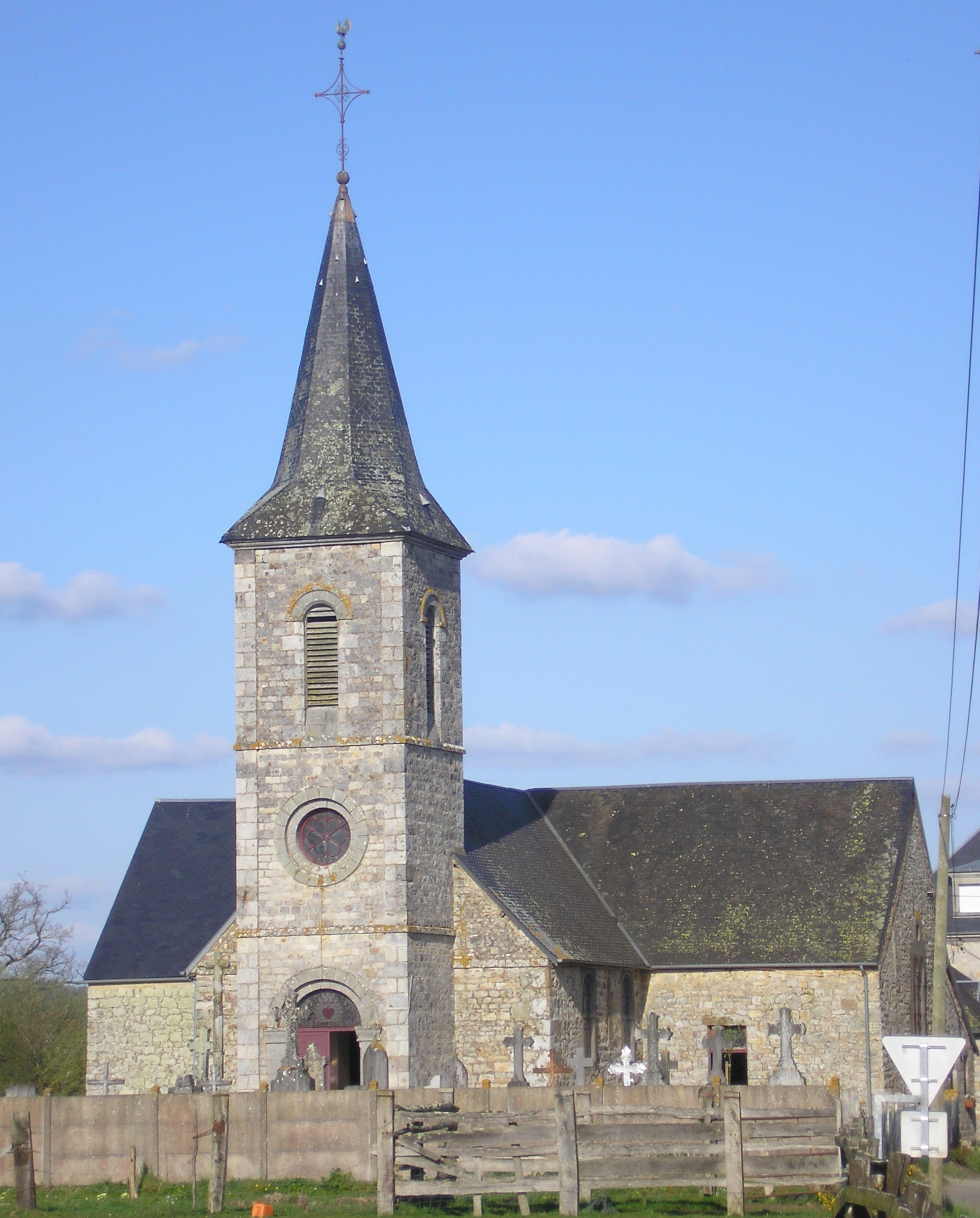 Saint-Gilles-des-Marais (Normandie, France). L'église Saint-Gilles.